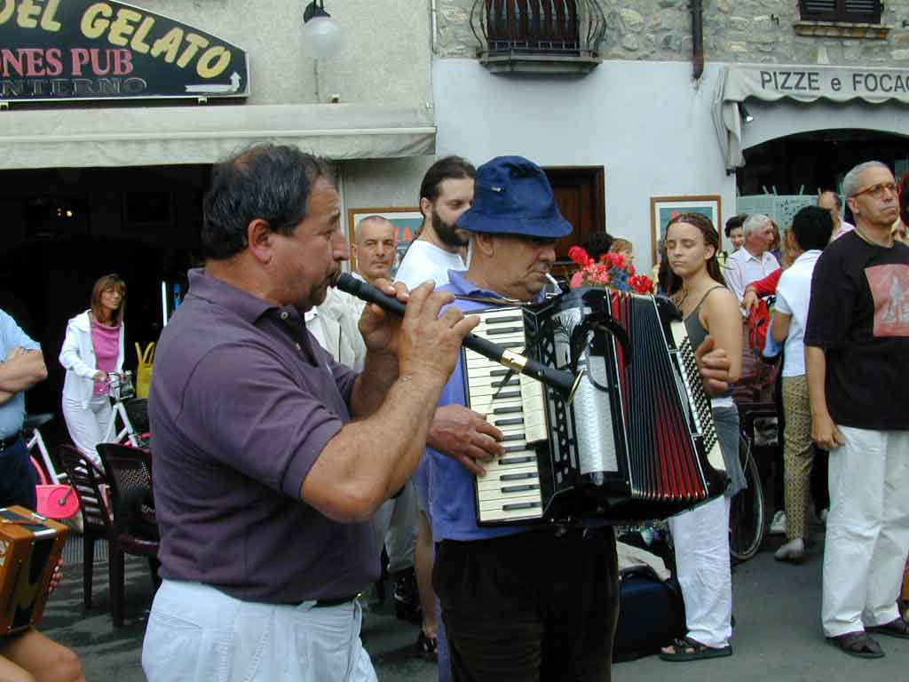 (from Italian Wikipedia) il pifferaio Ettore Losini suona insieme al fisarmonicista Attilio Rocca nella piazza di Bobbio (PC) in data 2003 Foto scattata personalmente e concessa con la GFDL